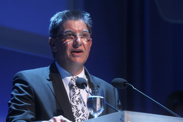 Reuven Kuvent